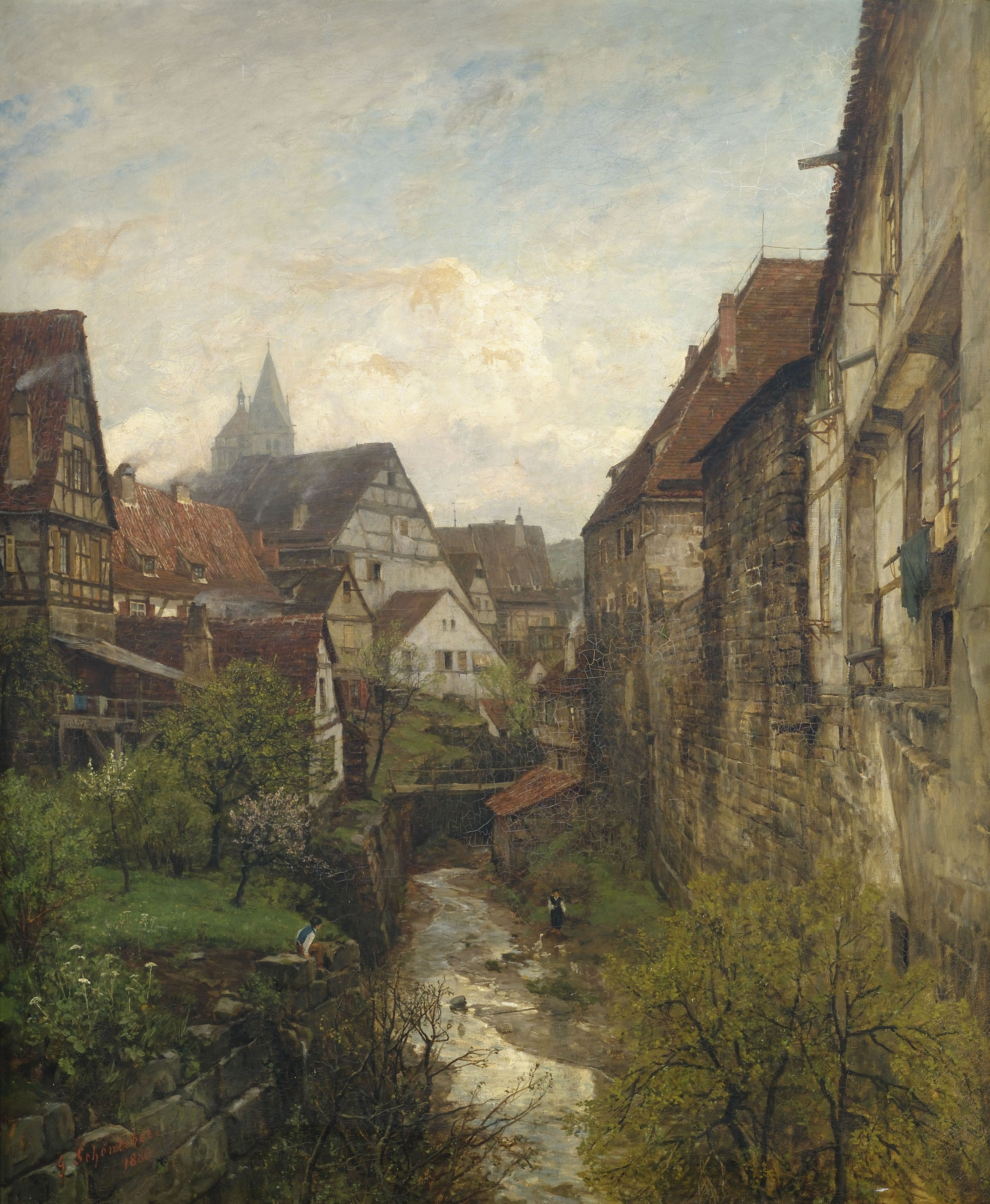 Partie in der Esslinger Altstadt am Stadtgraben mit den beiden Türmen der Stadtkirche im Hintergrund. Öl auf Leinwand, 124 x 97 cm, signiert und datiert 1880.